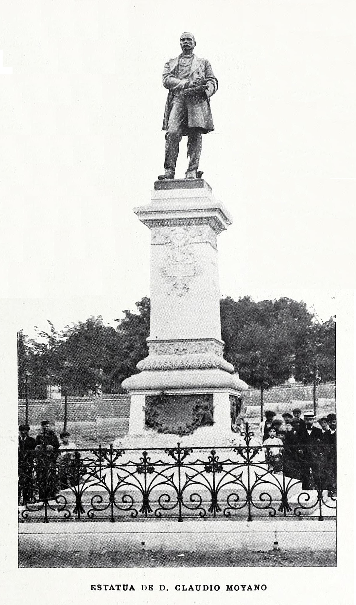 Estatua de D. Claudio Moyano. This is a retouched picture, which means that it has been digitally altered from its original version. Modifications: The nearby text present in the publication has been blanked.